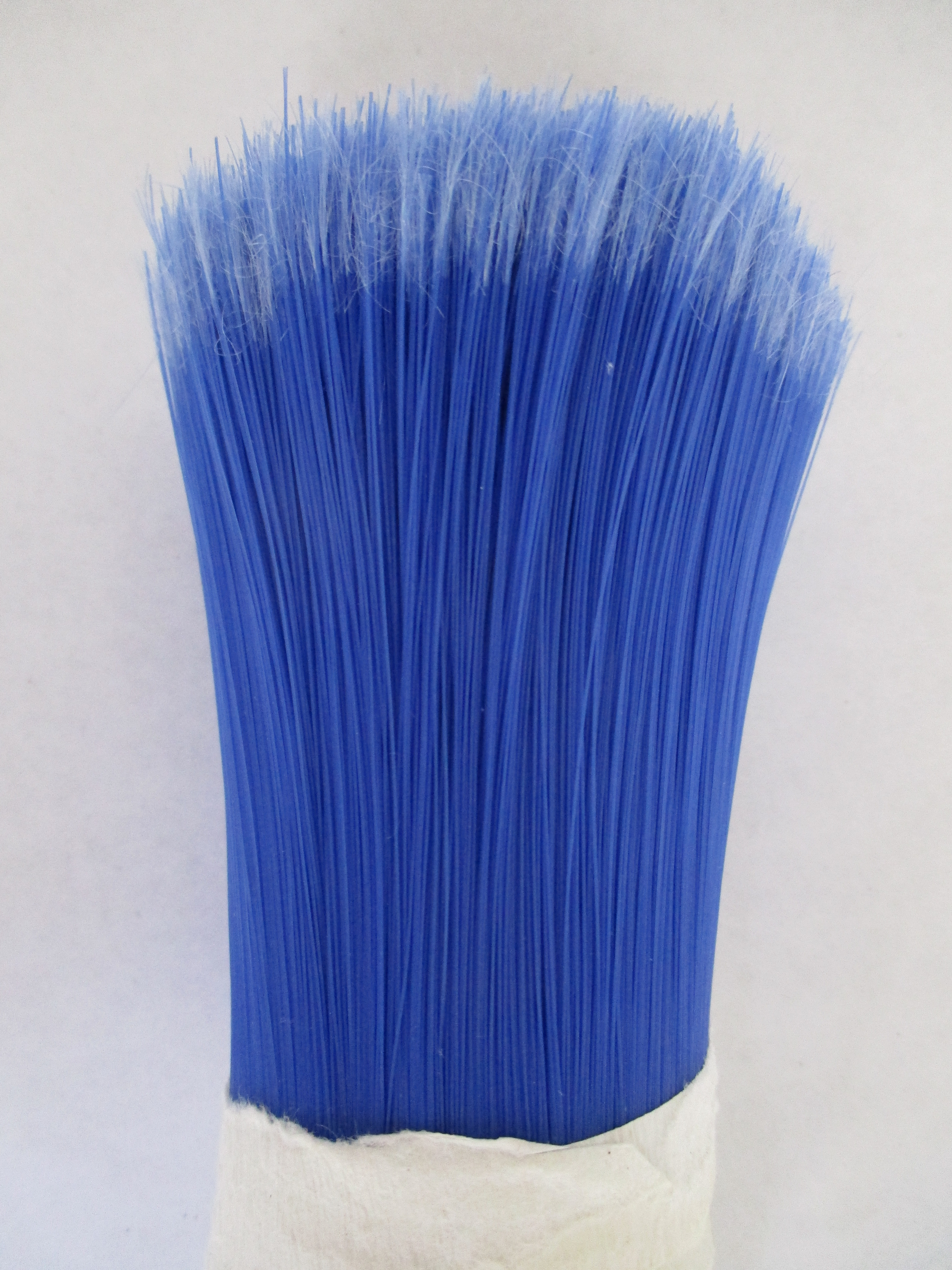 Bottes de fibres polyamides (rilsan) fleurées pour balai (préparation de fibres Moissonnier)